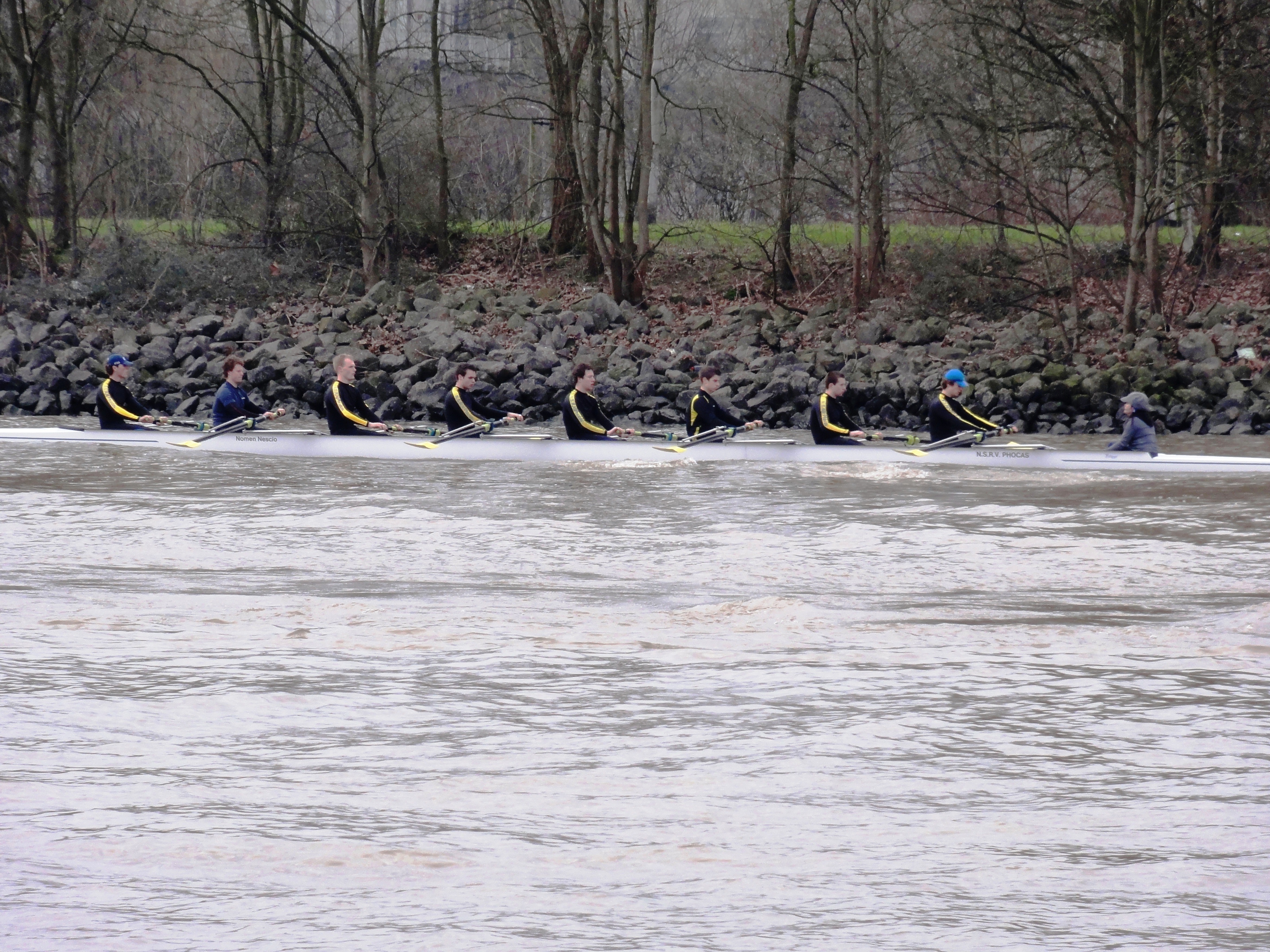 Nijmegen, een roeiers-acht van Phocas op het Maas-Waalkanaal